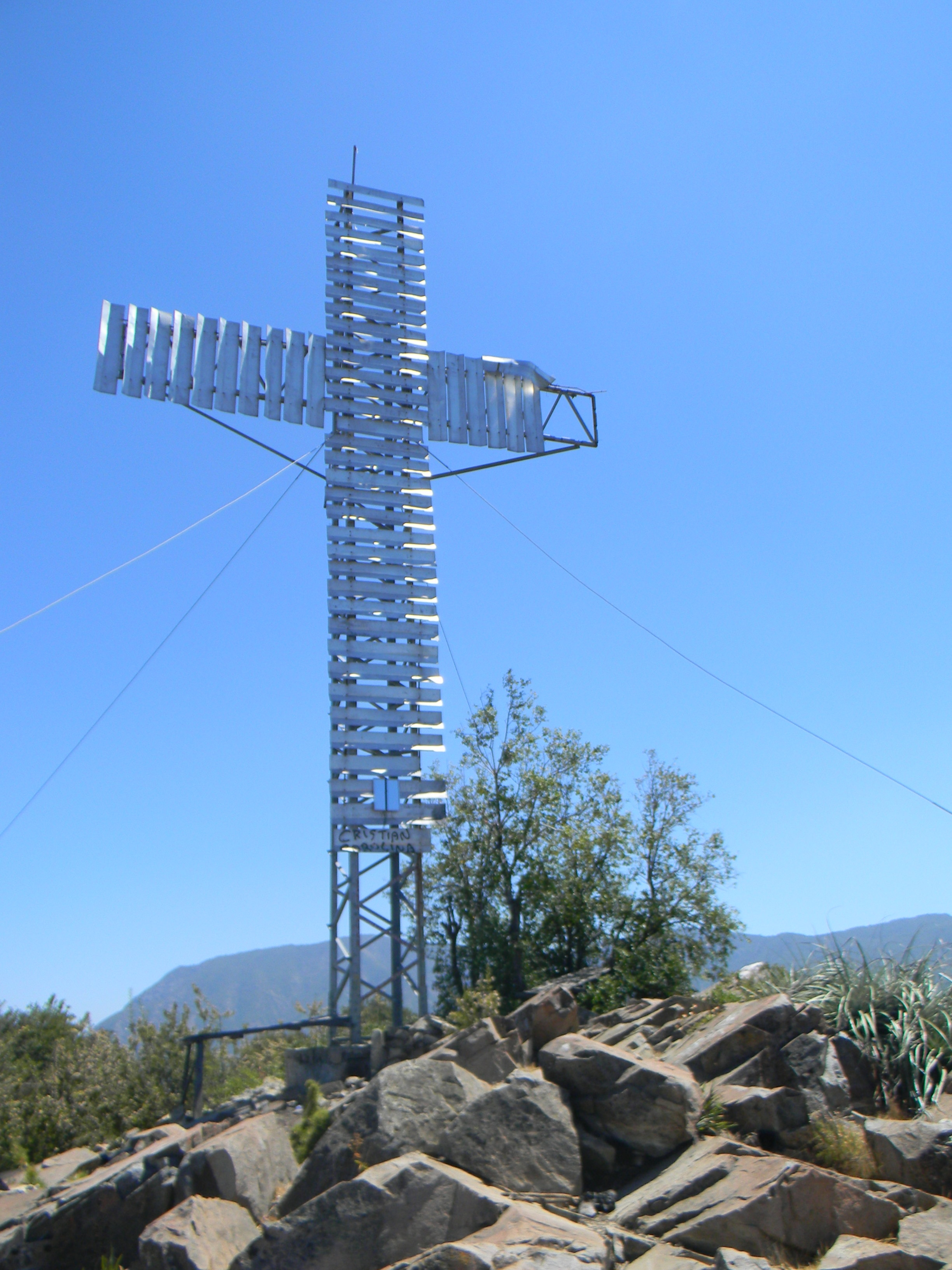 Este monumento se erige imponente sobre el pueblo de Lo Miranda a unos 1540 msnm. y mira al valle del Cachapoal